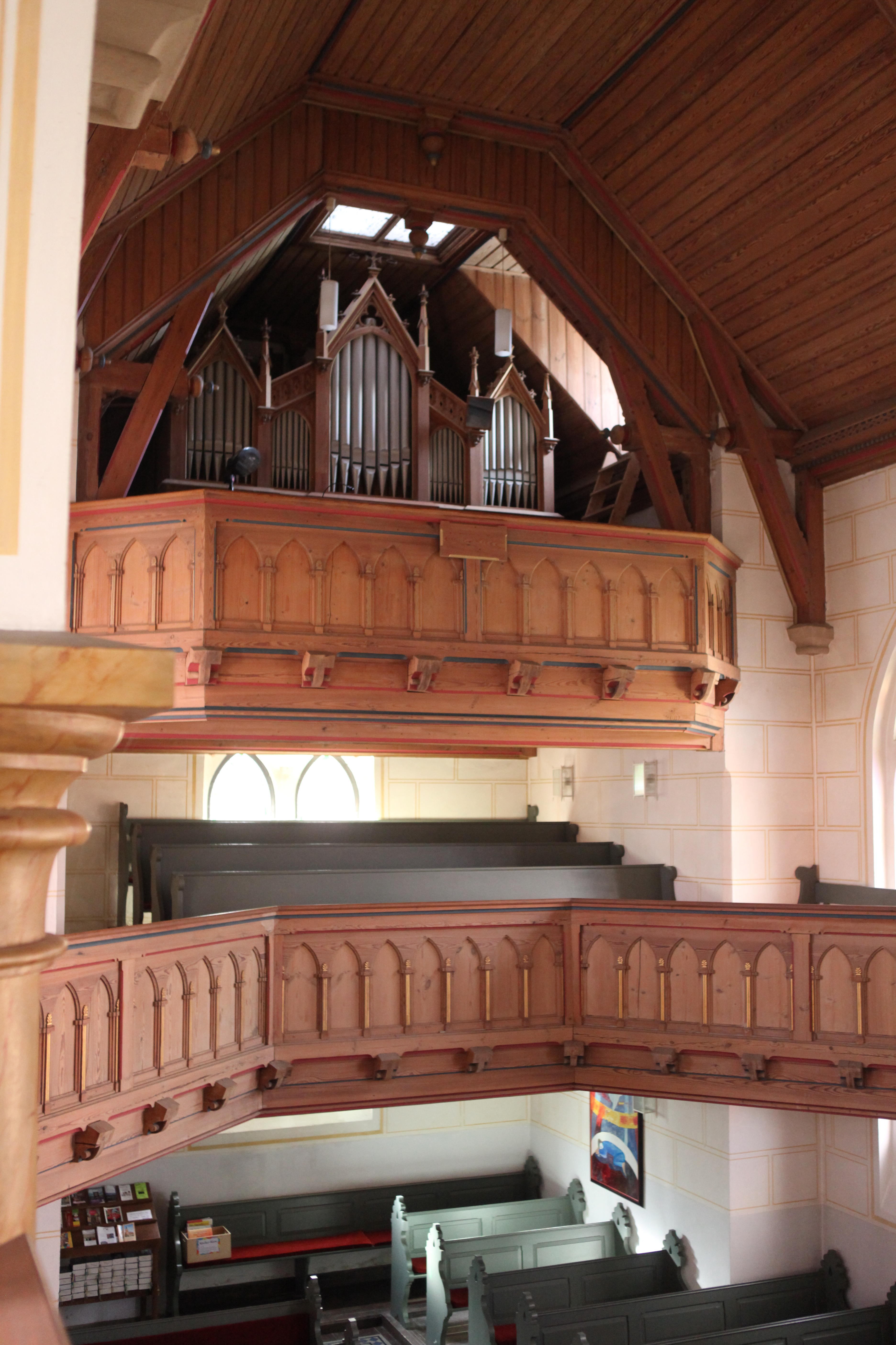 Wiesenfeld Magdalenenkirche Orgel